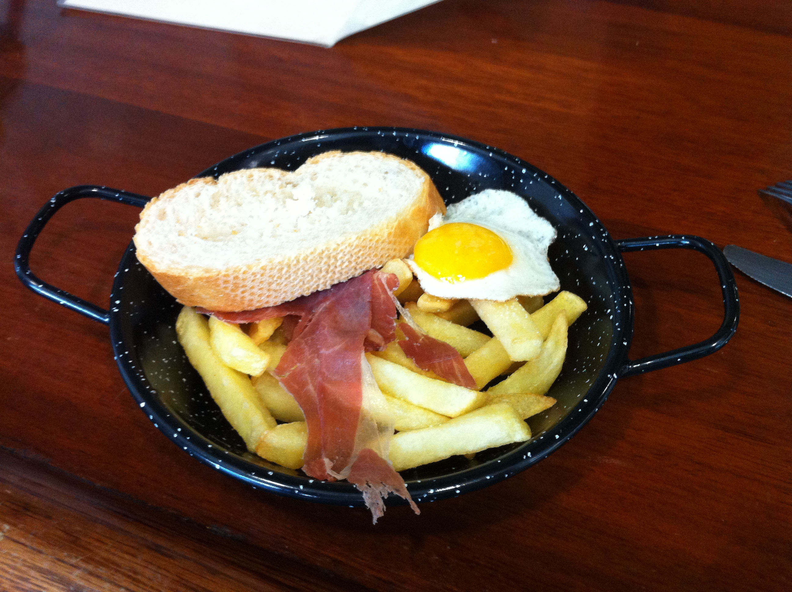 Tapa de huevos rotos